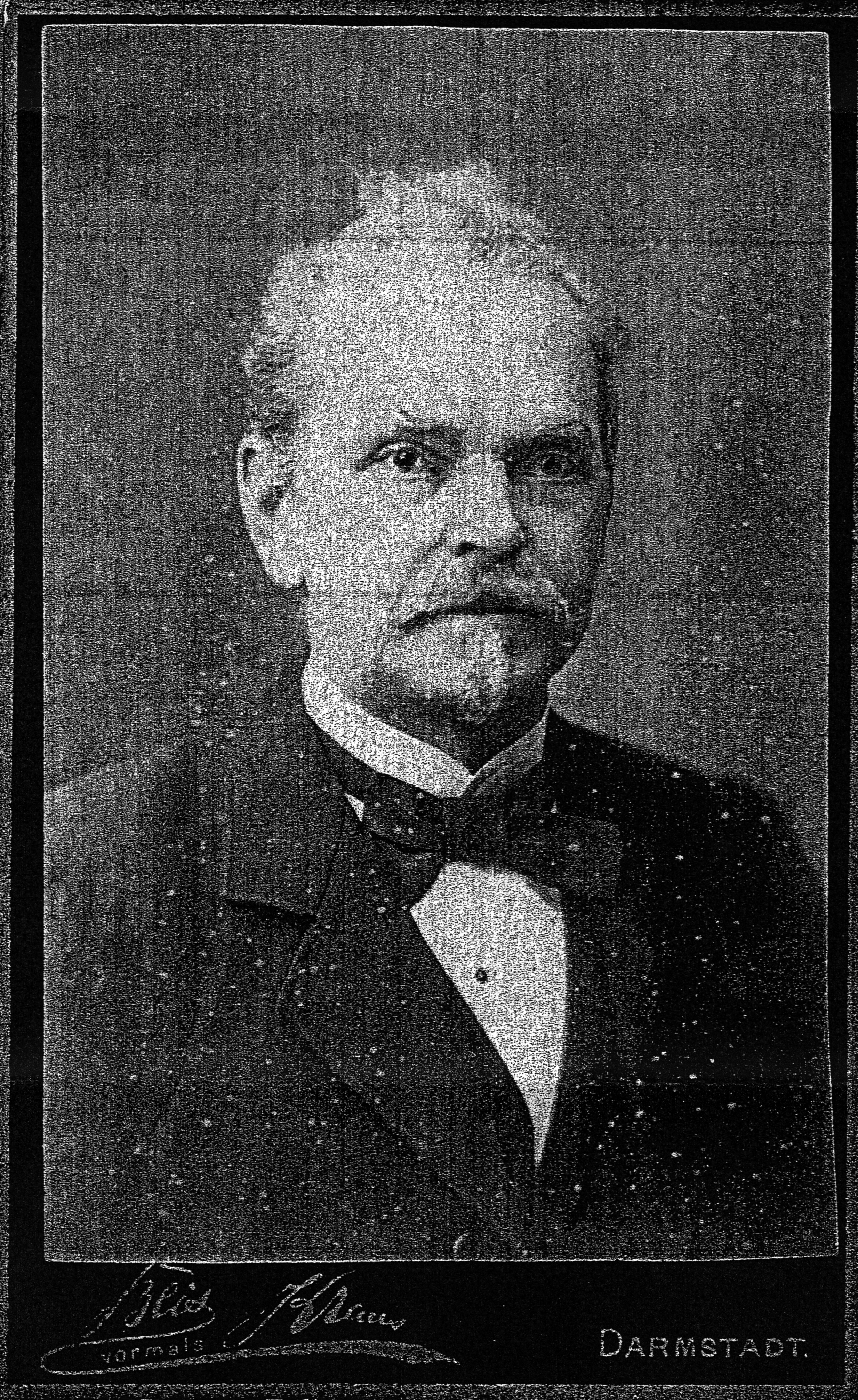 August Boltz, Portraitfoto aus seiner Darmstaedter Zeit Grund = Diese Fotografie zeigt den Linguisten August Boltz, der auch durch seine Sprachlehrbücher bekannt wurde.